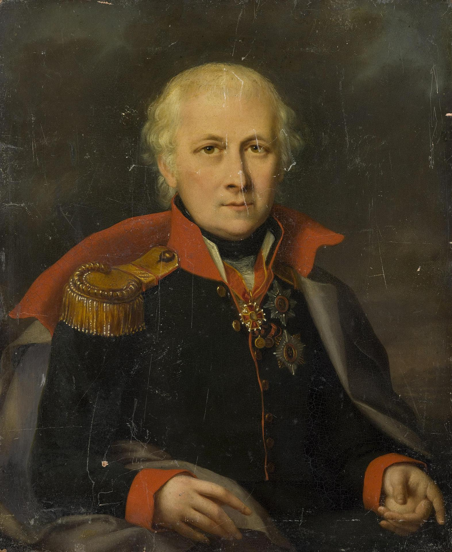 Портрет Николая Семёновича Мордвинова